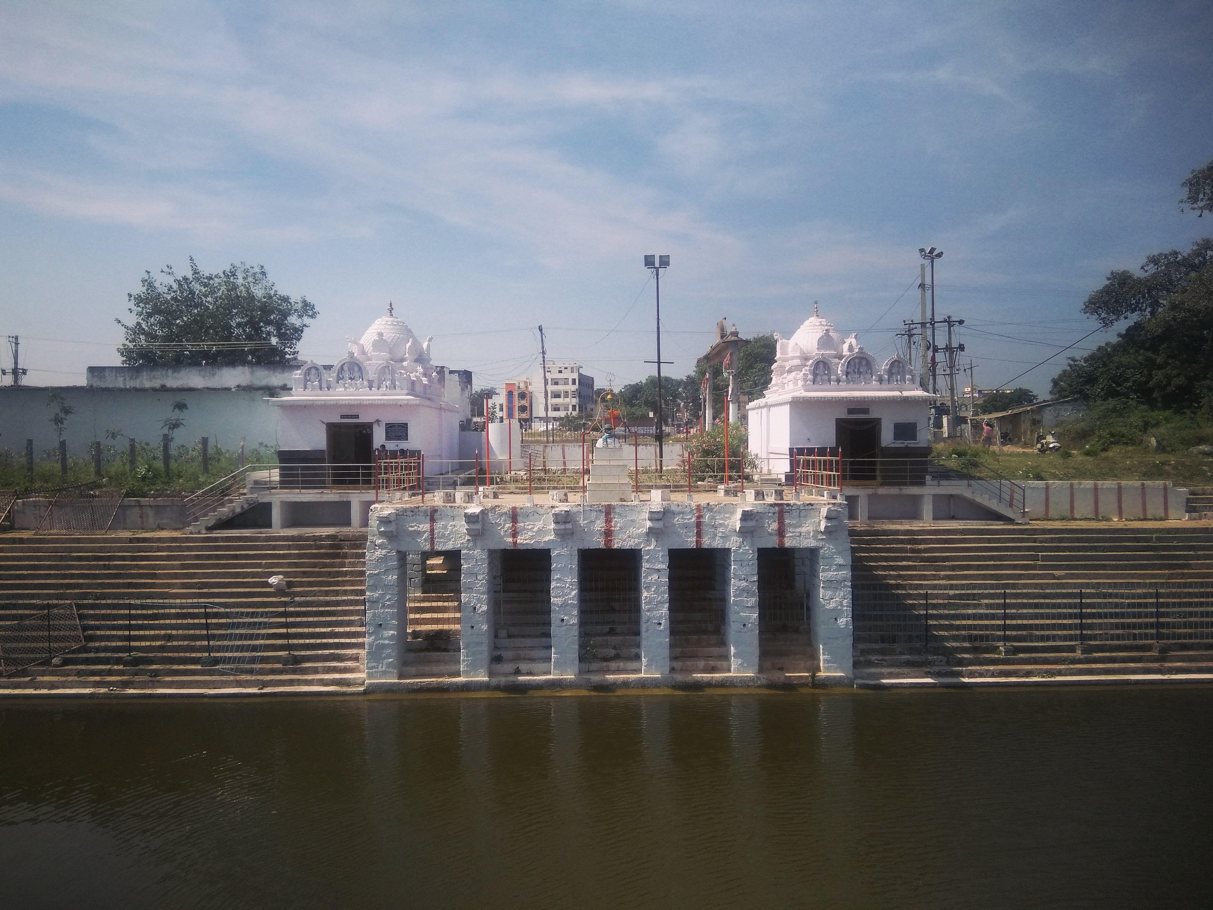 శ్రీ గంగారాజరాజేశ్వరీదేవి దేవాలయం,మహేశ్వరం: రంగారెడ్డి జిల్లా మహేశ్వరం రాజరాజేశ్వరీ ఆలయానికి నాలుగు దశాబ్దాల చరిత్ర ఉంది.గోల్కొండ నవాబు తానీషా కాలంలో అక్కన్న మాదన్నలు 1673-1680 మధ్య కాలంలో ఈ ఆలయాన్ని కట్టించారని చారిత్రాక ఆధారాలు తెలియజేస్తున్నాయి. అక్కన్న మాదన్నలు హత్యకు గురైన తరువాత ఆలయం కొంచెం నిర్లక్ష్యానికి గురరైంది.1687 లో ఔరంగాజేబు దండయాత్ర చేసి రాతితో ఉన్న విగ్రహాలు ధ్వంసం అయ్యాయి. అప్పటినుండీ 1979 వరకూ ఈ ఆలయం పూర్తిగా శిథిలావస్థలో ఉంది.20 వ శతాబ్దపు తొలినాళ్లలో ఈ ఆలయం పూర్వ వైభవాన్ని సంతరించుకుంది. మూడున్నర దశాబ్దాల క్రింద మహేశ్వరం పాఠశాలకు ప్రధానోపాధ్యాయుడిగా వచ్చిన టి.శంకర్ ఆధ్వర్యంలో గ్రామస్తులు మరియు గ్రామపెద్దల సహకారంతో 1980 లో ఆలయ అభివృద్ధికి శ్రీకారం చుట్టారు. దీనికి అప్పటి ముఖ్యమంత్రి మర్రి చెన్నారెడ్డి సహకారం తోడయింది. కాశీ నుండి తెప్పించిన ప్రత్యేక శివలింగాన్ని ప్రధాన ఆలయంలో ప్రతిష్టించారు. అదే నెలలో శివరాత్రి కావడంతో బ్రహ్మోత్సవాలను ప్రారంభించారు.అప్పటినుండీ క్రమంగా ఈ ఆలయానికి భక్తులు పెరిగారు. విశాలమైన చతురస్త్రాకార పుష్కరిణిలో రాజరాజేశ్వరుడు రాజేశ్వరీ దేవితో కలిసి ఉద్భవించినట్లు భక్తుల నమ్మకం. అందుకే పుష్కరిణి మధ్యభాగంలో రెండంతుస్తులతో ప్రధాన ఆలయాన్ని నిర్మించారు. క్రింది అంతస్తులో రాజేశ్వరీ దేవికిి,పైన అంతస్తులో రాజేశ్వరుడికీ ప్రత్యేక పూజలు నిర్వహిస్తారు. పుష్కరిణి లో స్నానం చేసి రాజరాజేశ్వరీ దేవిని దర్శించుకోవడానికి వీలుగా రెండు రాతి వంతెనలు నిర్మించారు. కోనేరు చుట్టూ షోడశమూర్తులు అంటే పదహారు రూపాల్లో కొలువైన పదహారు శివాలయాలు ఉంటాయి. వీటిలో హరిహరేశ్వరుడు,మల్లీశ్వరుడు,అవిముక్తేశ్వరుడు,అఘోరేశ్వరుడూ,అమరేశ్వరుడు,అమృతేశ్వరుడు,గంగాధరేశ్వరుడు,ఇష్టకామేశ్వరుడూ,ముక్తేశ్వరుడూ,శ్రీ కాళహస్తీశ్వరుడూ,ఏకాంబరేశ్వరుడూ,మణికంఠేశ్వరుడూ,మహానందీశ్వరుడు,అమరావతీశ్వరుడు,కాశీపతీశ్వరుడు,మంగళ గౌరీశ్వరుడి రూపాల్లో పరమశివుడు నిత్య పూజలందుకుంటున్నాడు. ప్రయాణ మార్గం: హైదరాబాదుకి సుమారు 27 కిలోమీటర్ల దూరంలో ఉన్న ఈ శివగంగారాజరాజేశ్వరీ స్వామి ఆలయానికి బస్సు మార్గం ద్వారా చేరుకోవచ్చు.హైదరాబాద్ లోని చార్మినార్, కోఠి,ఇబ్రహీంపట్నం, చాంద్రాయణగుట్ట ,రాజేంద్రనగర్ నుండి మహేశ్వరానికి ఆర్టీసీ సదుపాయం ఉంది. Sivaganga Raja Rajeshwari Devi Temple Maheshwaram, Telangana 501359